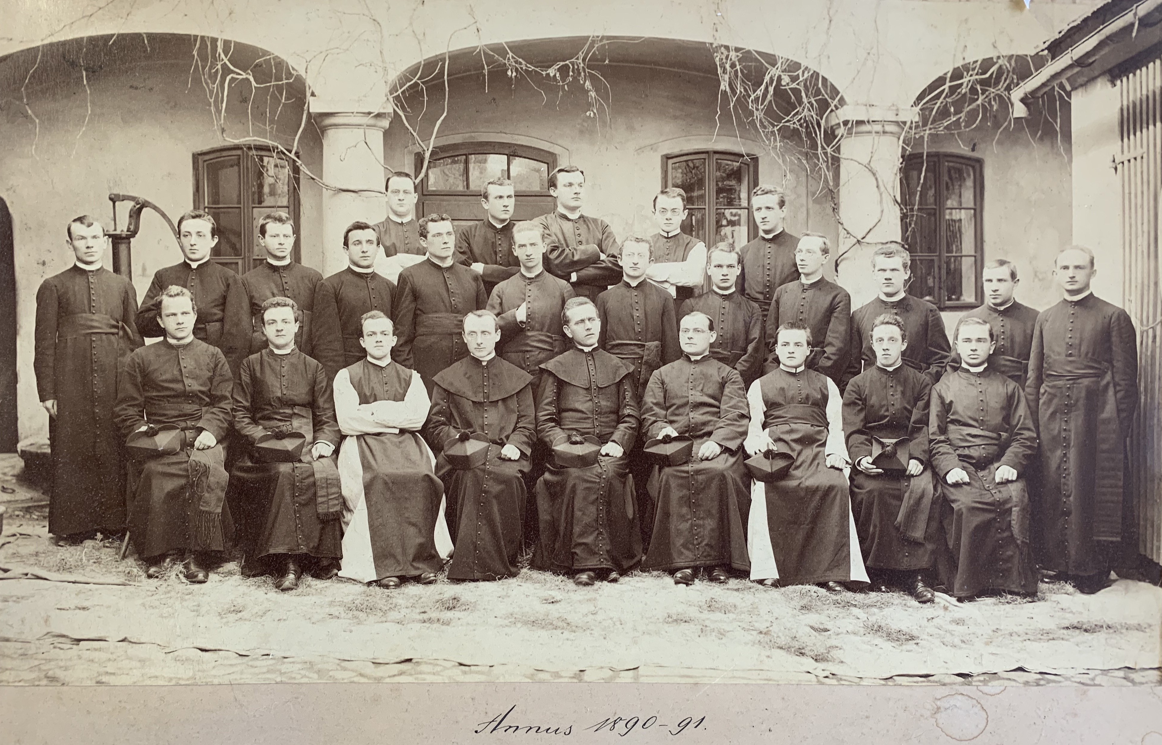 Tablo 4. ročníku litoměřického kněžského semináře z let 1890-1891. Uprostřed dole sedí rektor semináře František Kordač, pozdější pražský arcibiskup a po jeho pravici spirituál Josef Kowař.